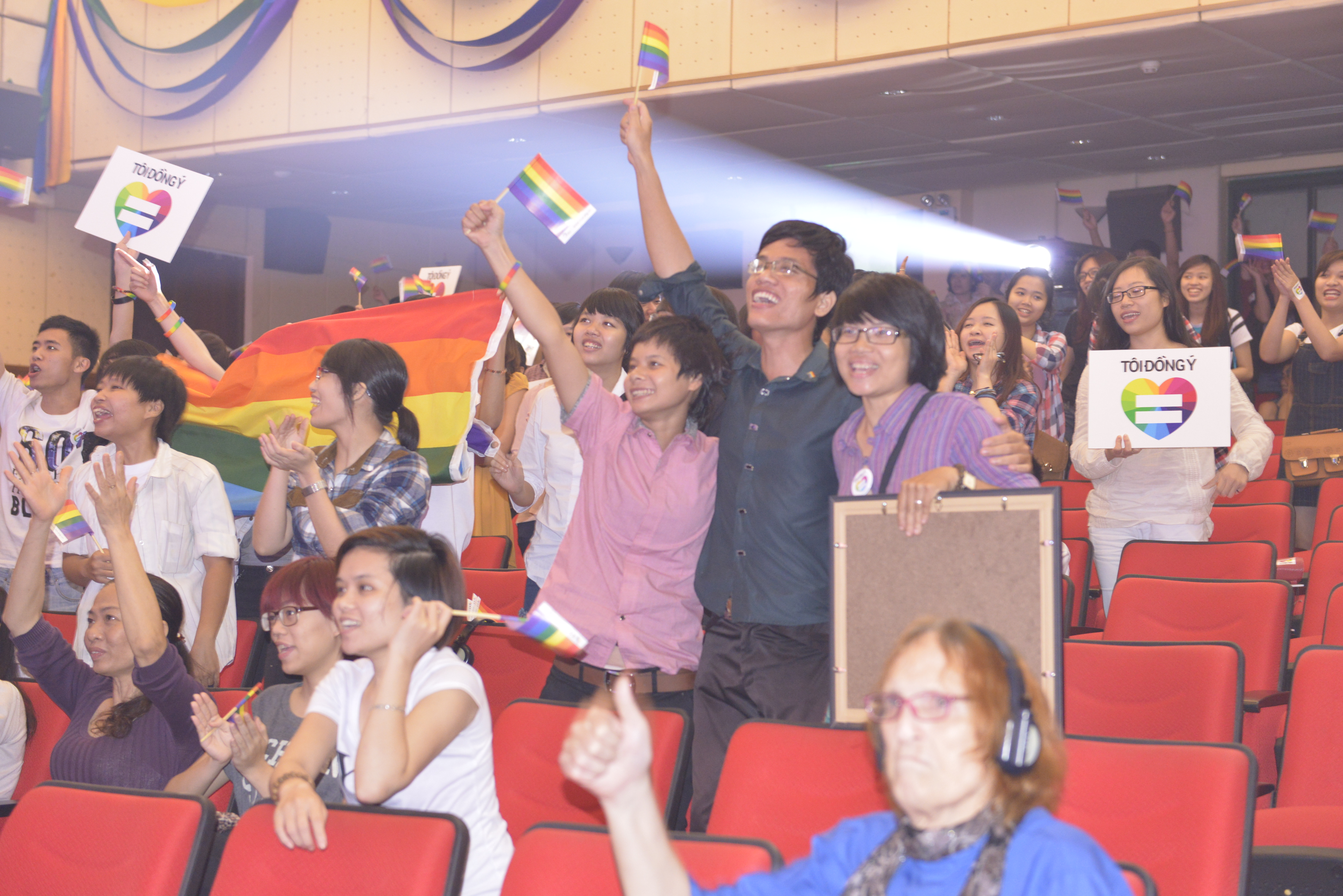 USAID Vietnam